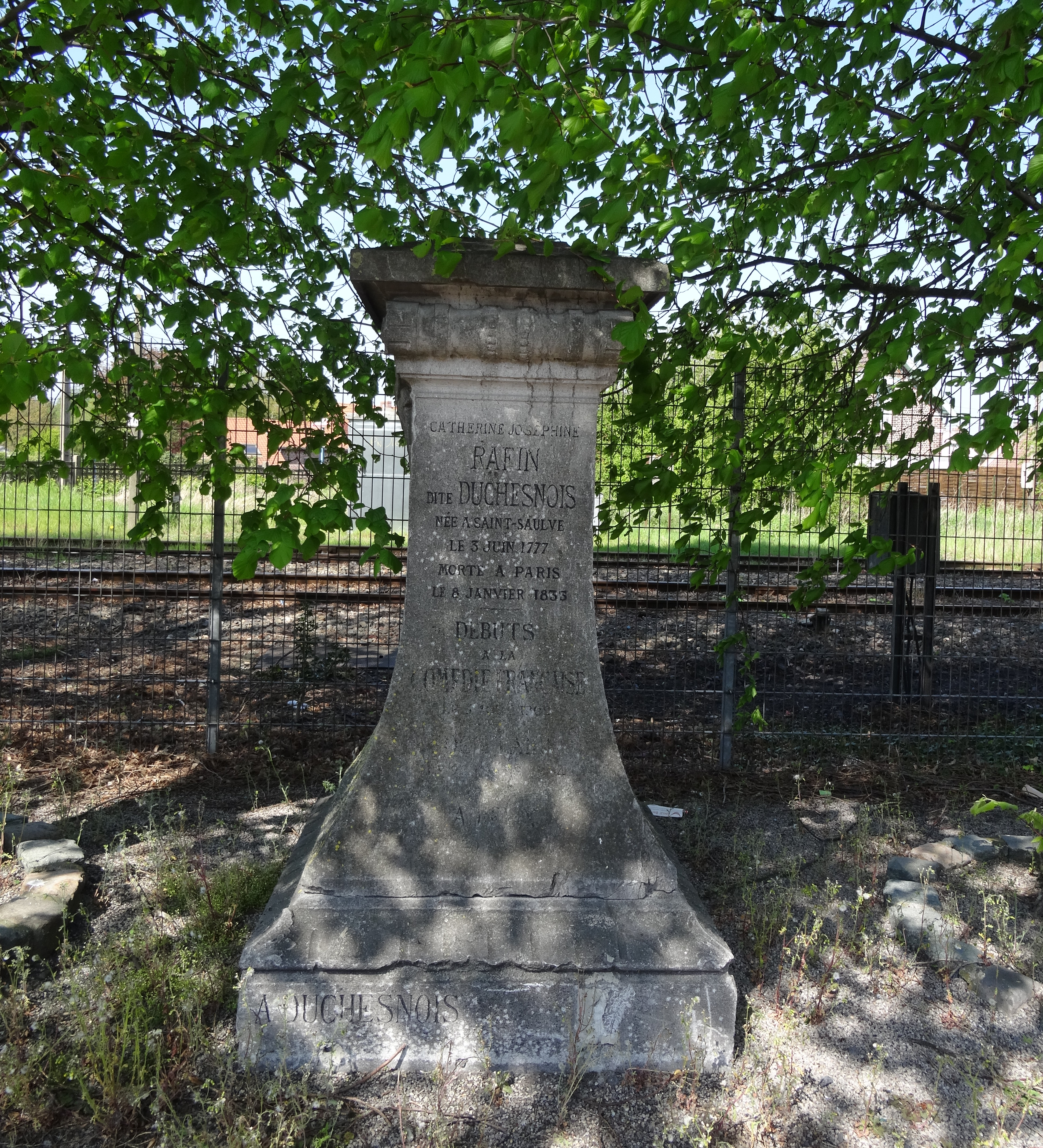 Depicted place: Monument à Catherine-Joséphine Duchesnois